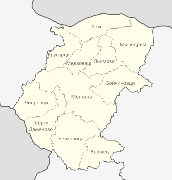 Картата е създадена от Любомир Таушанов